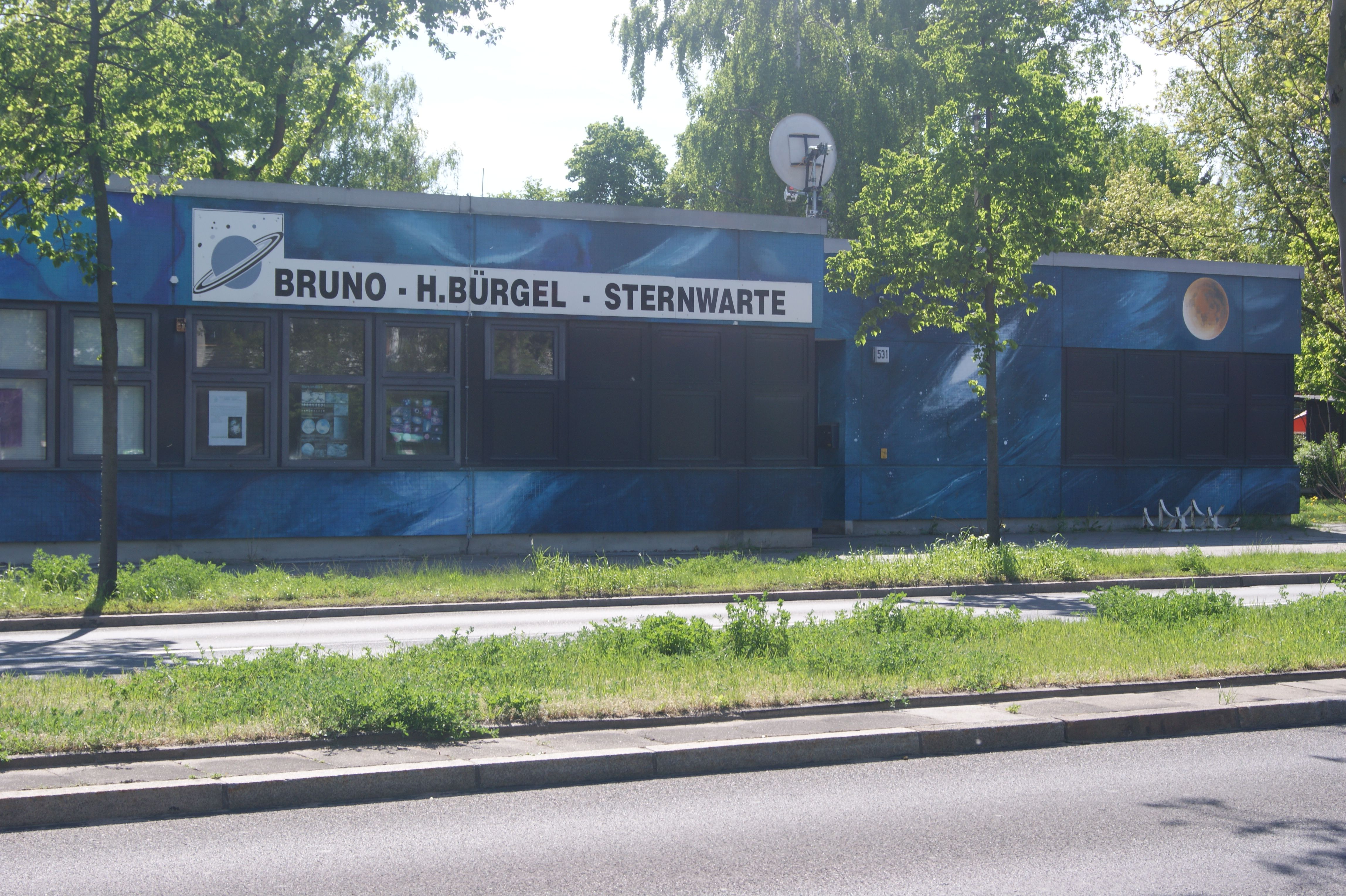 Räume der Sternwarte im ehemaligen Zollhaus am Grenzkontrollpunkt Staaken